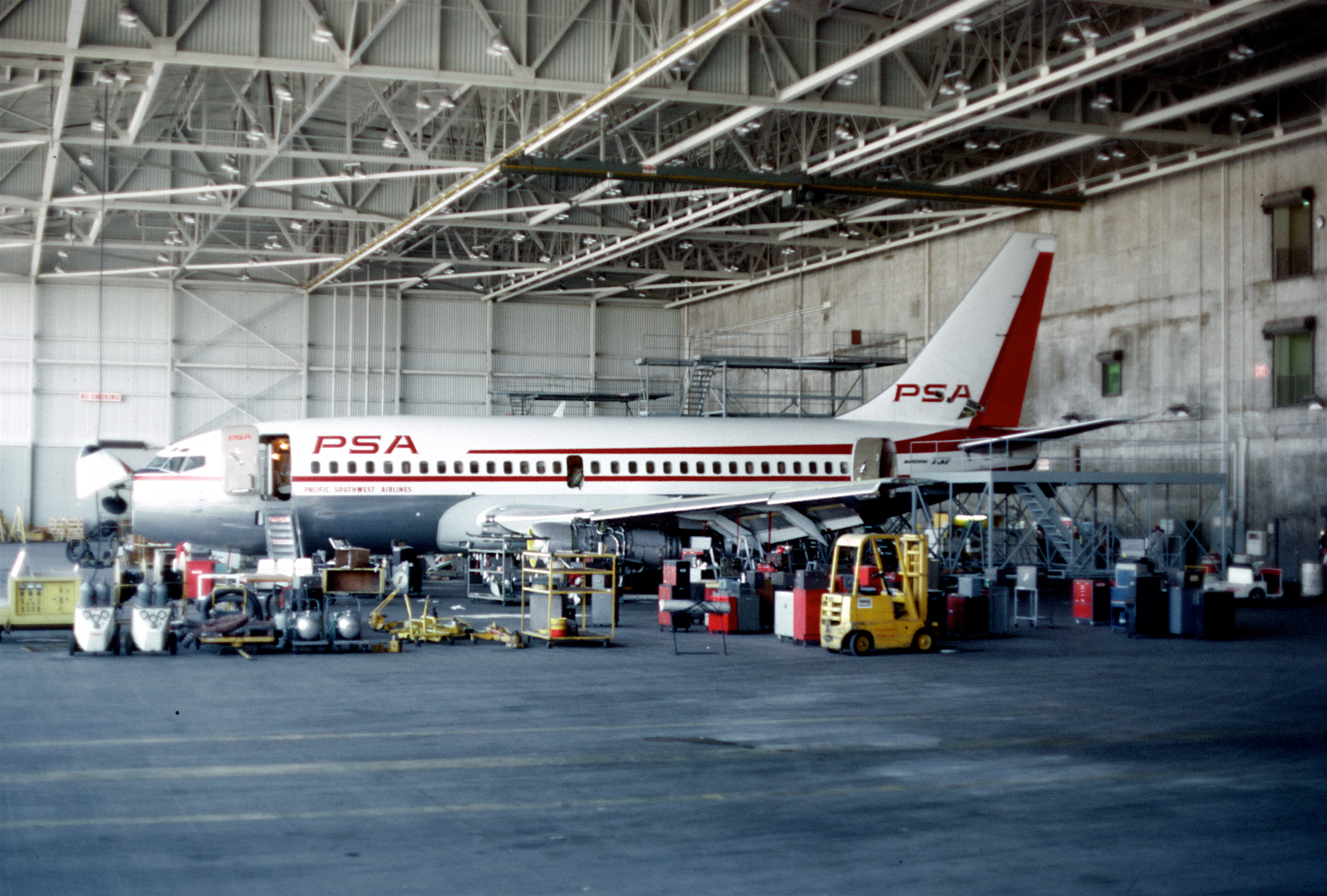 PSA Boeing 737-200, June 1970